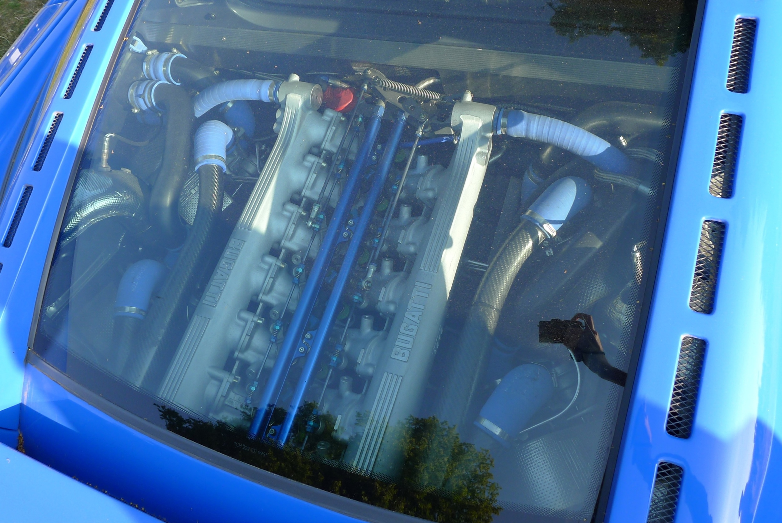 V12 Quad-Turbo